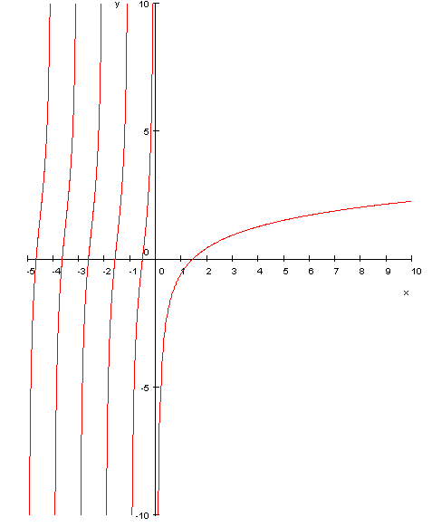 digamma function